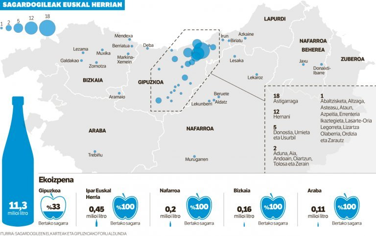 Cider producers in the Basque Country